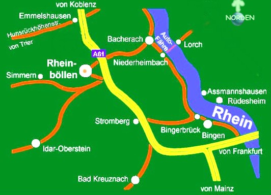 Lageplan Rheinboellen